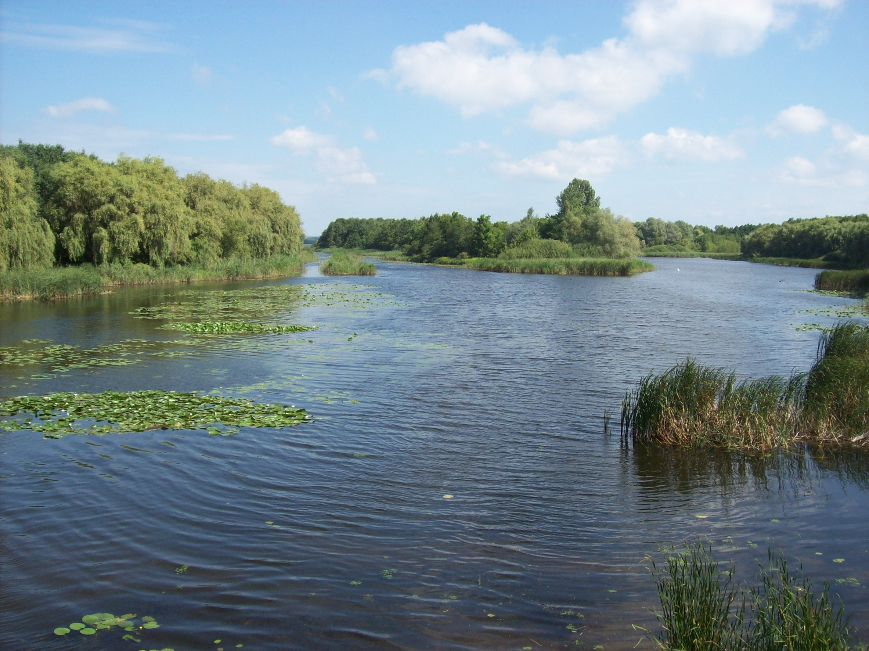 Kis-Balaton - view from the Kányavári sziget hídja to north